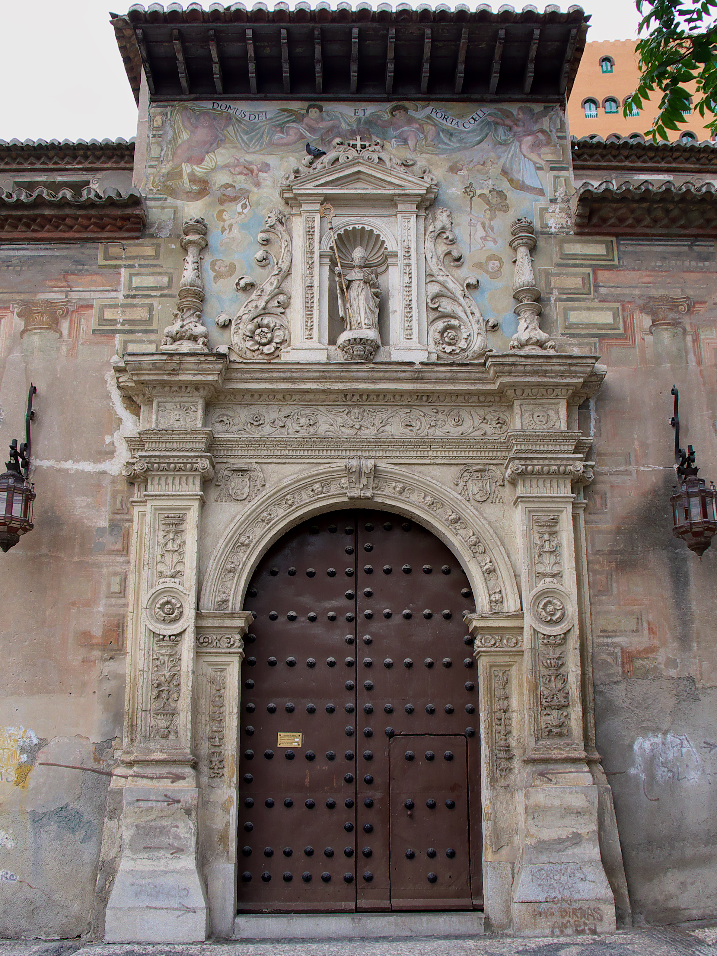 Interesante portada de Juan de Marquina.